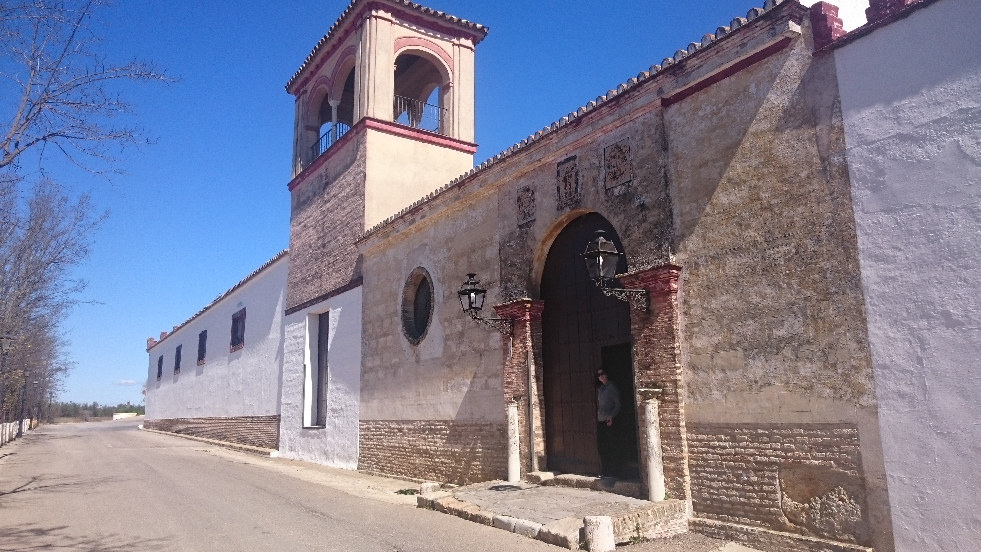 Portada principal de la Hacienda del Loreto en Espartinas, provincia de Sevilla.